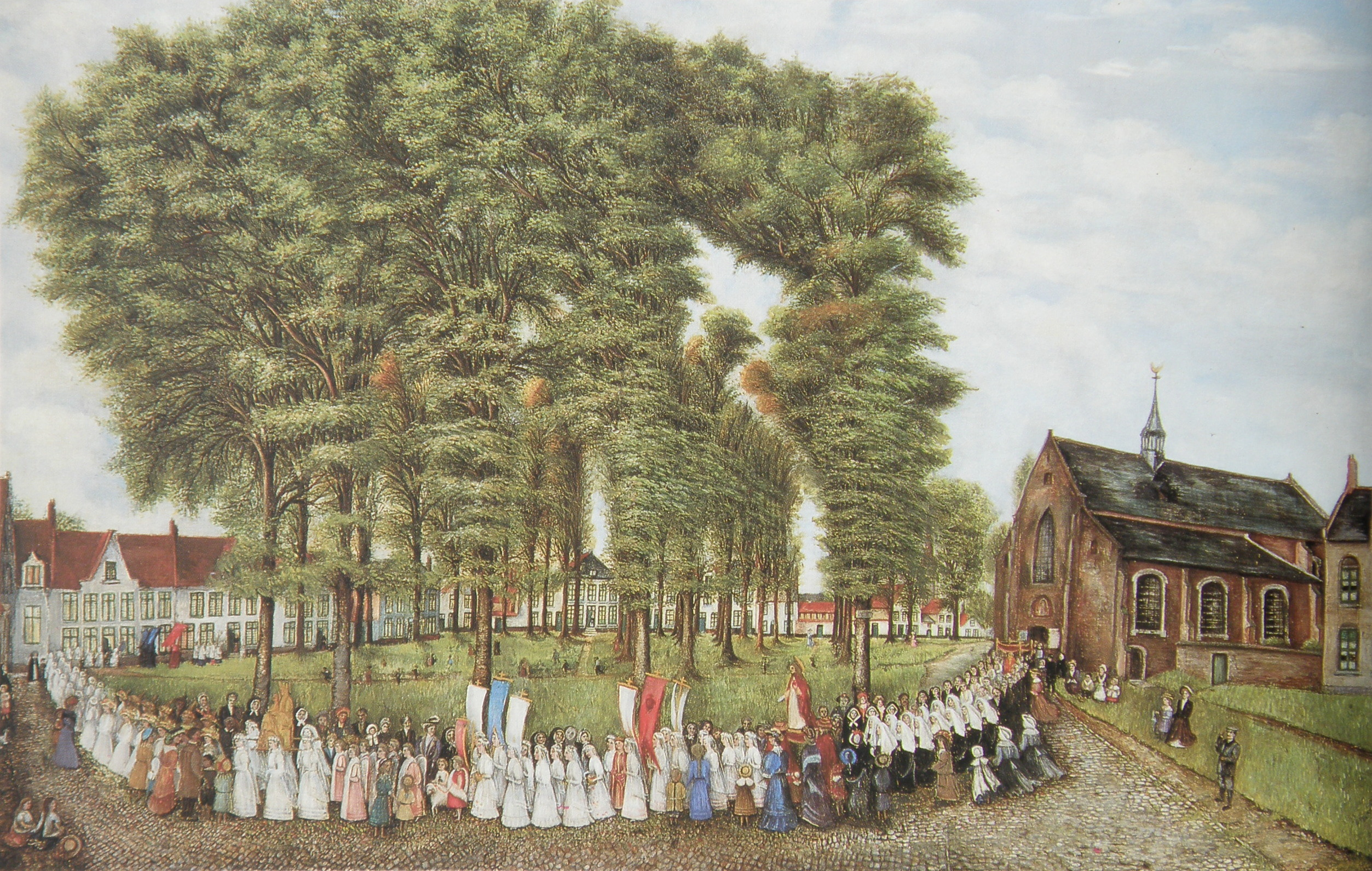 Sacramentsprocessie in het begijnhof, schilderij van Maria Van Hecke, ca. 1880. Begijnhofmuseum Brugge.